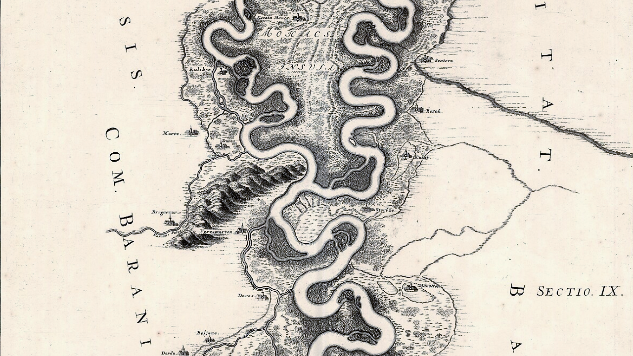 [La Hongrie Et Le Danube : En XXXI. Cartes très fidelément gravées d'après les Desseins originaux & les Plans levez sur les lieux par l'Auteur même. Ouvrage où l'on voit la Hongrie, par rapport à ses Riviers, à ses Antiquez Romaines, & à ses Mines; & les Sources & le Cours du Danube, &c. Avec une Préface sur l'excellence & et l'usage de ces Cartes]. [Par Mr. Le Comte De Marsigli] Tab. XI, Sectio. IX Mohács - Vrangos